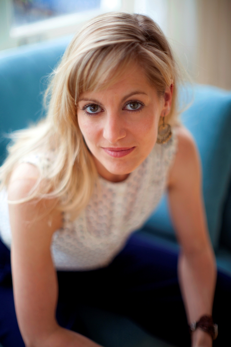 Kunsthistorica en Boudewijn BüchBiografe Eva Rovers